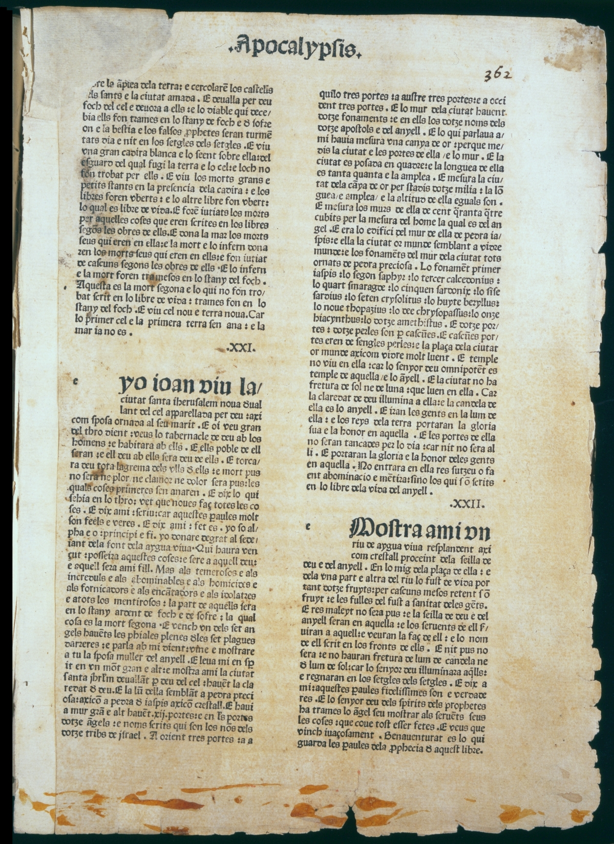 Última pàgina de la Bíblia Valenciana